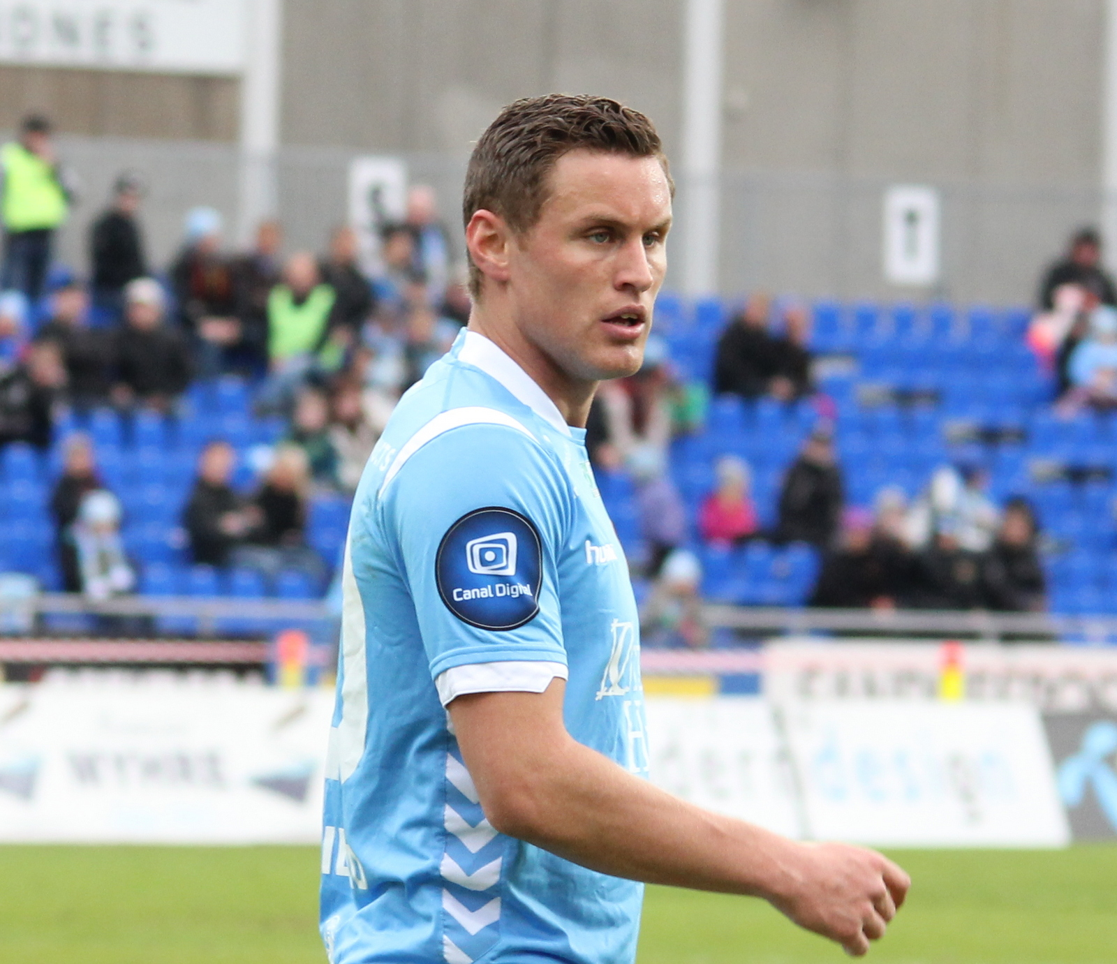 Tommy Høiland fotballspiller på Sandnes Stadion i kampen mellom Sandnes ULF mot Molde